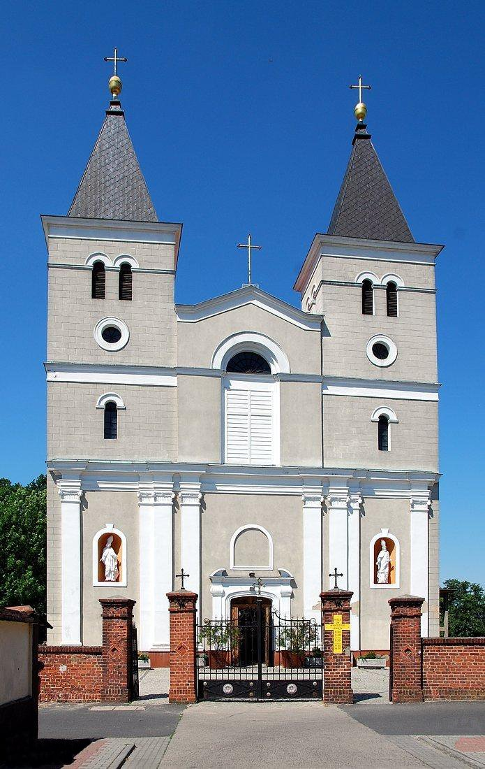 Kościół św. Wawrzyńca w Babimoście.